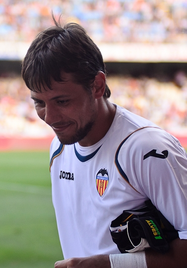 El jugador merengot Diego Alves